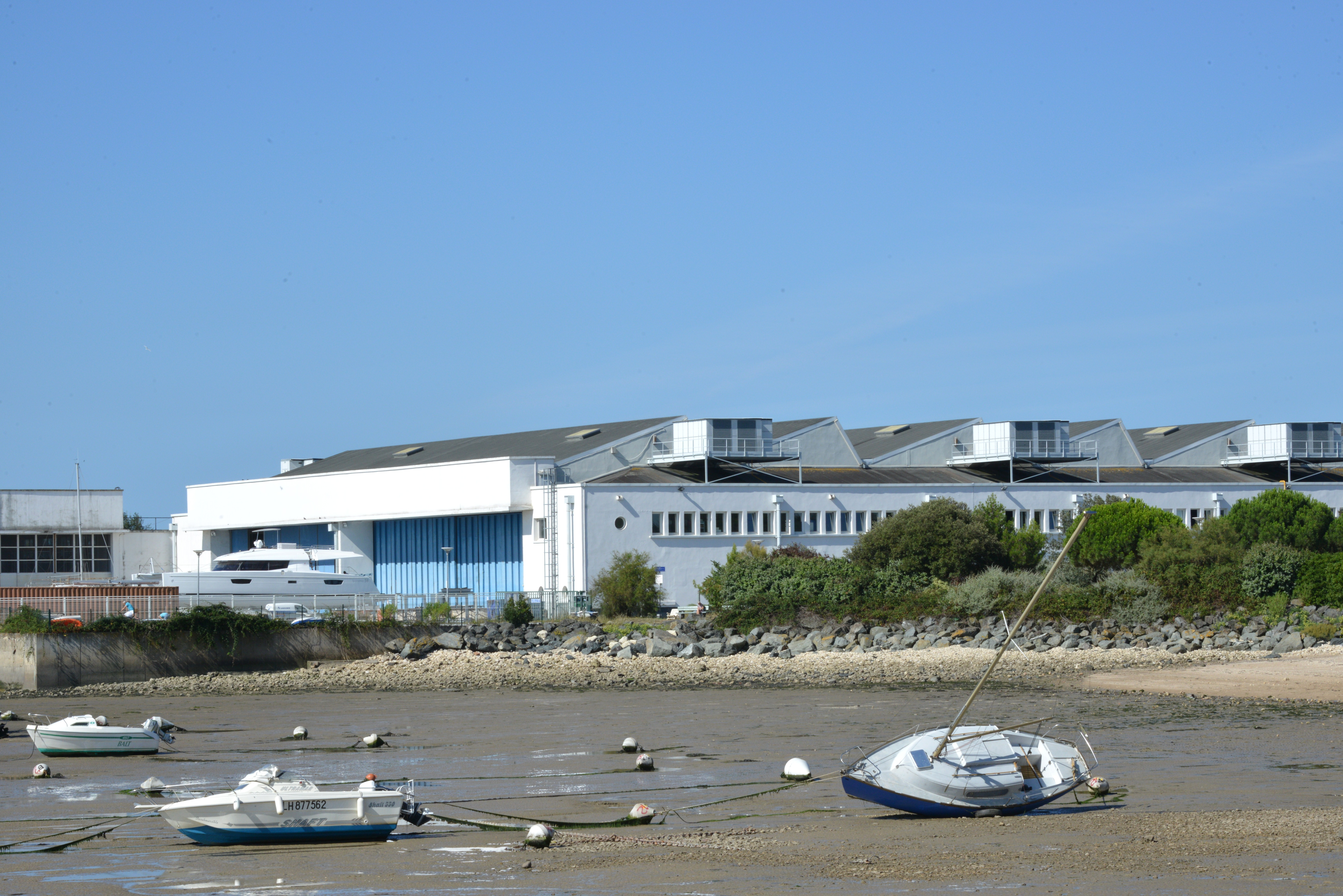 L’usine de l’ancienne Société de Construction Aéronavale (SCAN) située au Port-Neuf (dans l’anse du quartier de Port-Neuf) à La Rochelle. Vue générale de l’usine. La Rochelle, Charente-Maritime, France.